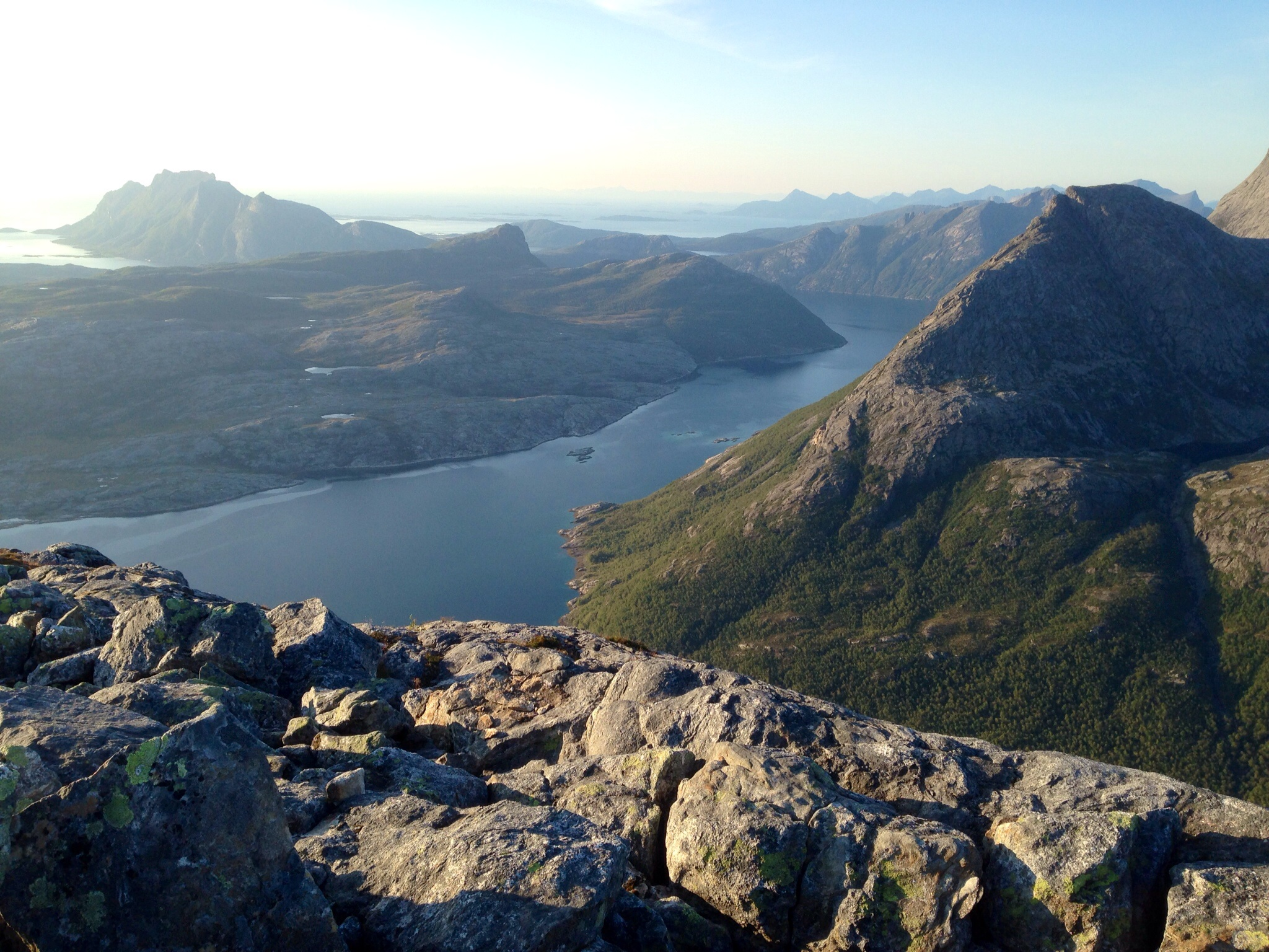 Sørfjorden, en fjordarm av Mistfjorden, i Bodø kommune i Nordland.